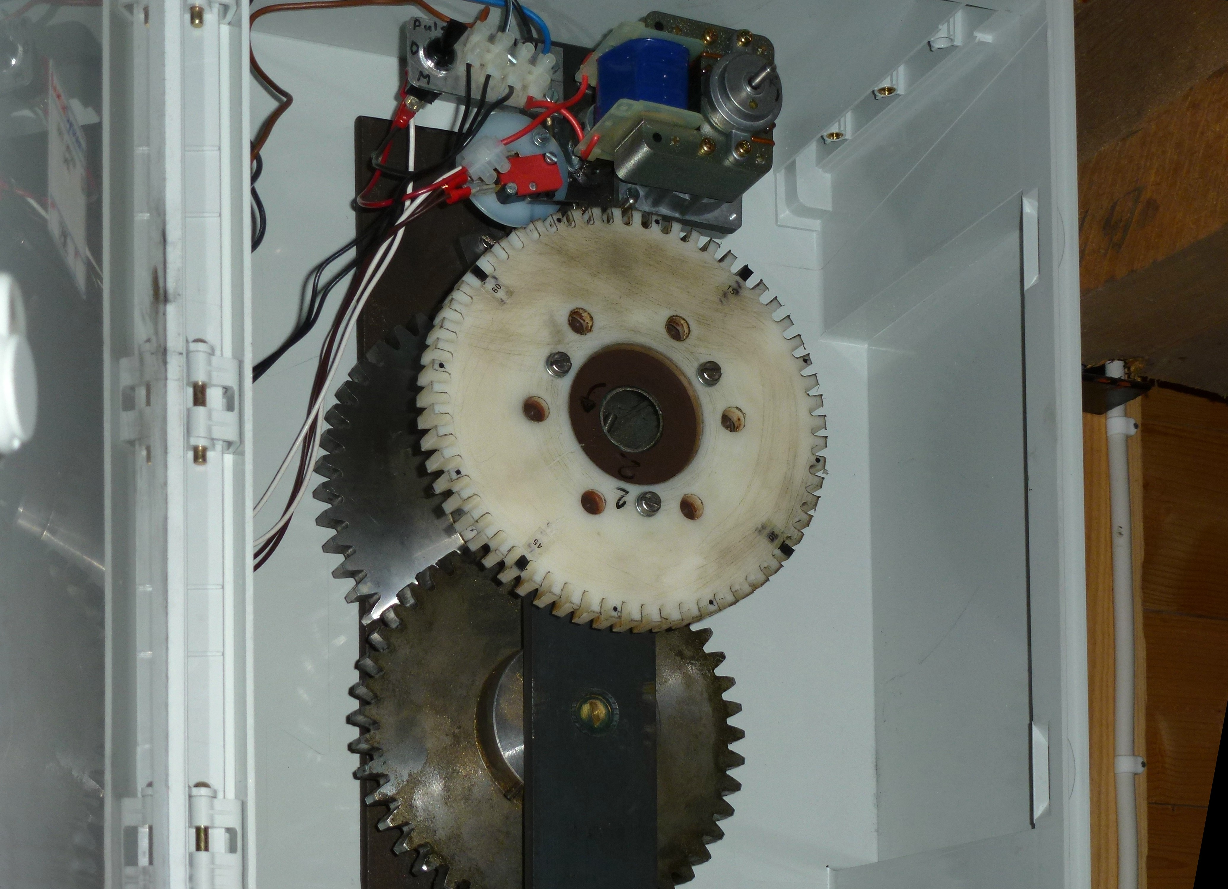 Katarina kyrkas tornur, urverket